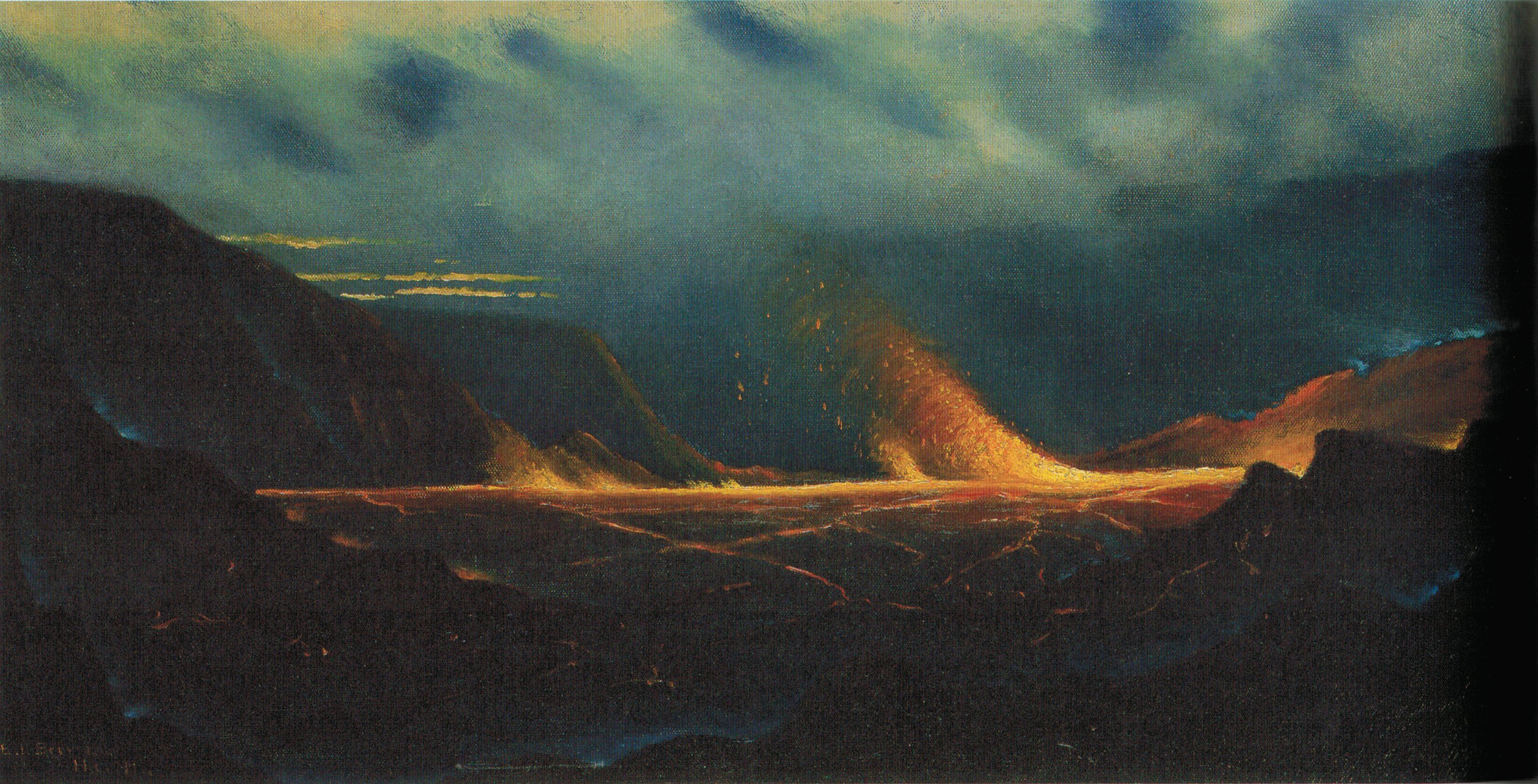 Kilauea